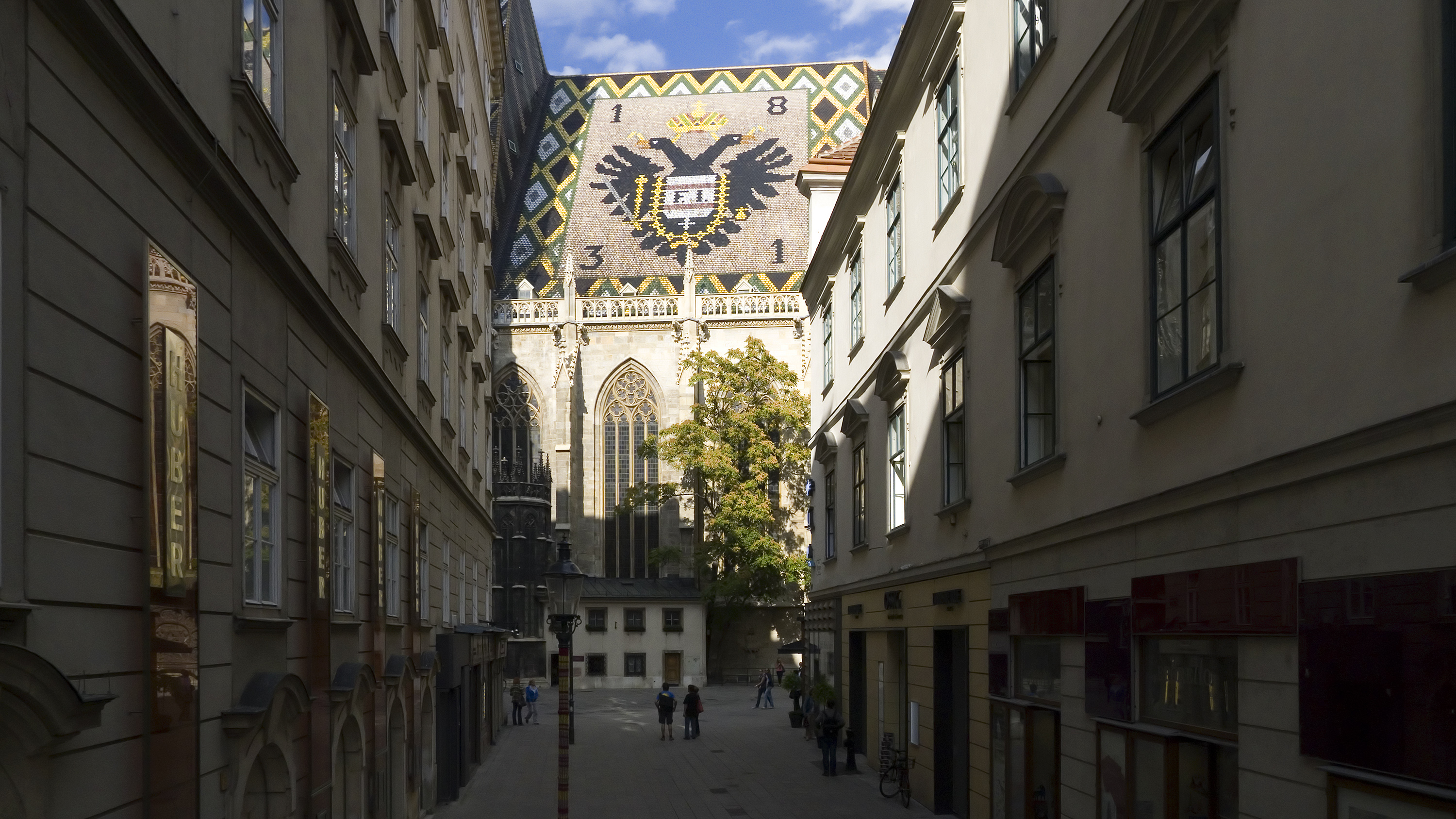 Churhausgasse in Wien 1 Richtung Norden